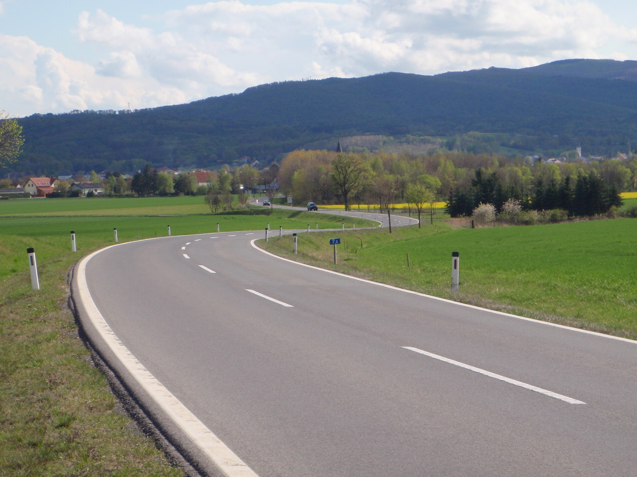 B61 főút Alsólászló felé a Kőszegi-hegységgel